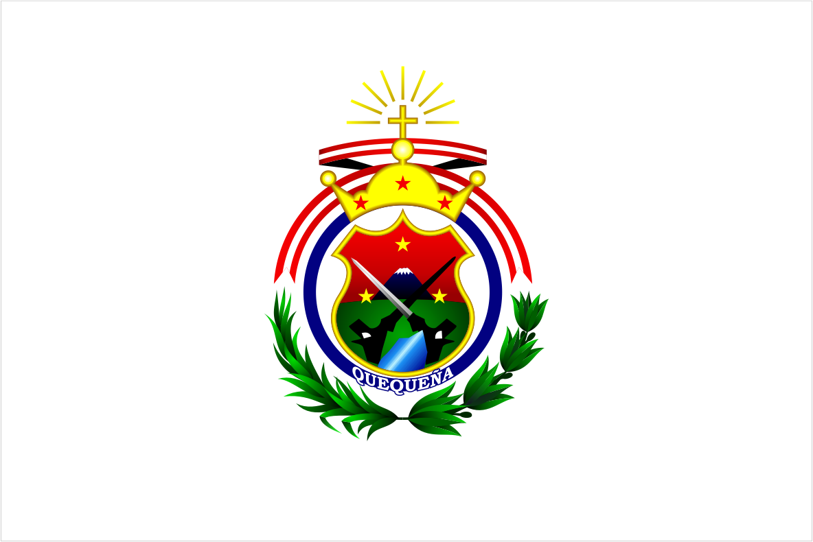 Distrito de Quequeña